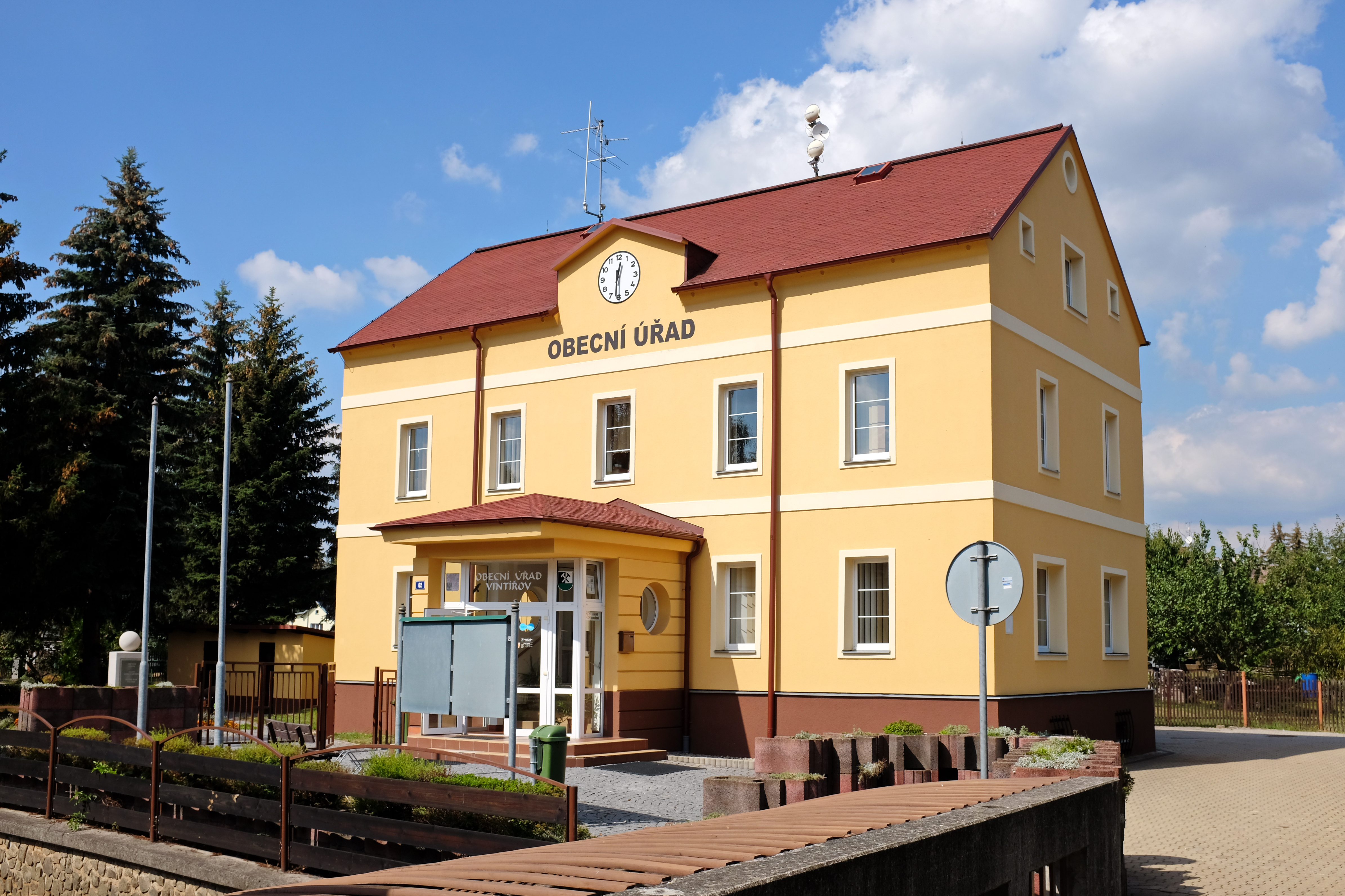 Vintířov, Obecní úřad, okres Sokolov